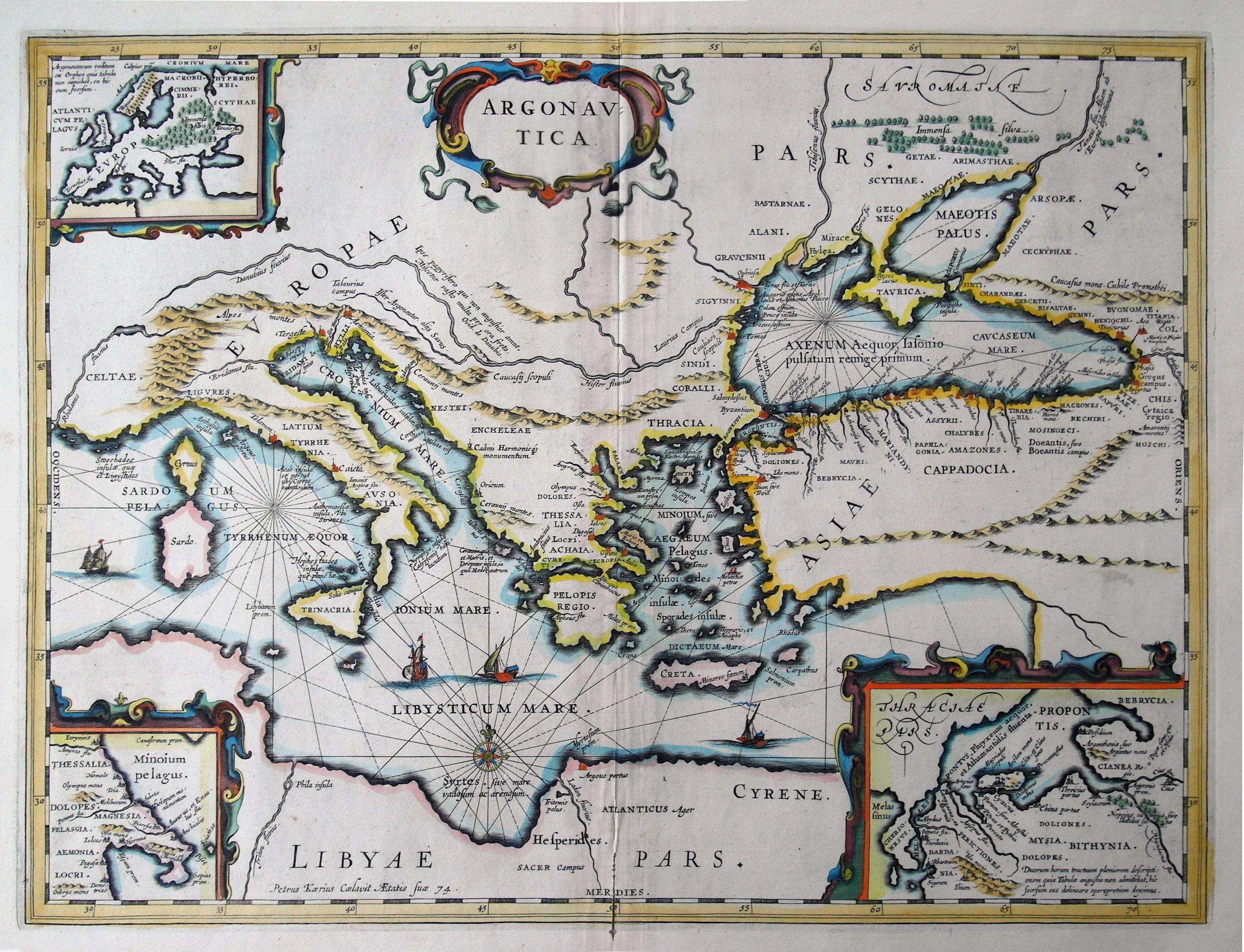 De Argonautica, door Kaerius gegraveerd toen hij 74 jaar oud was